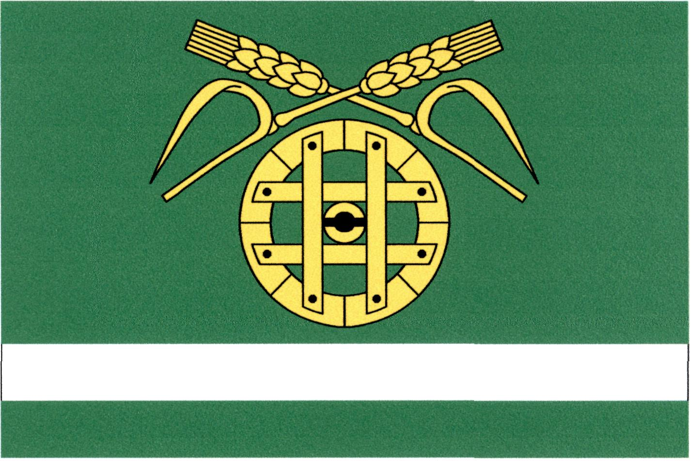 Vlajka obce Velký Borek